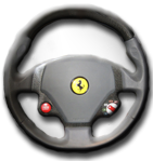 (immagine di servizio - icona per template)